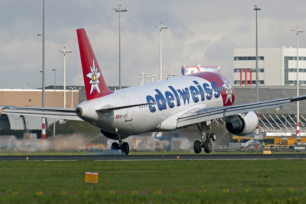 Airbus A320-214